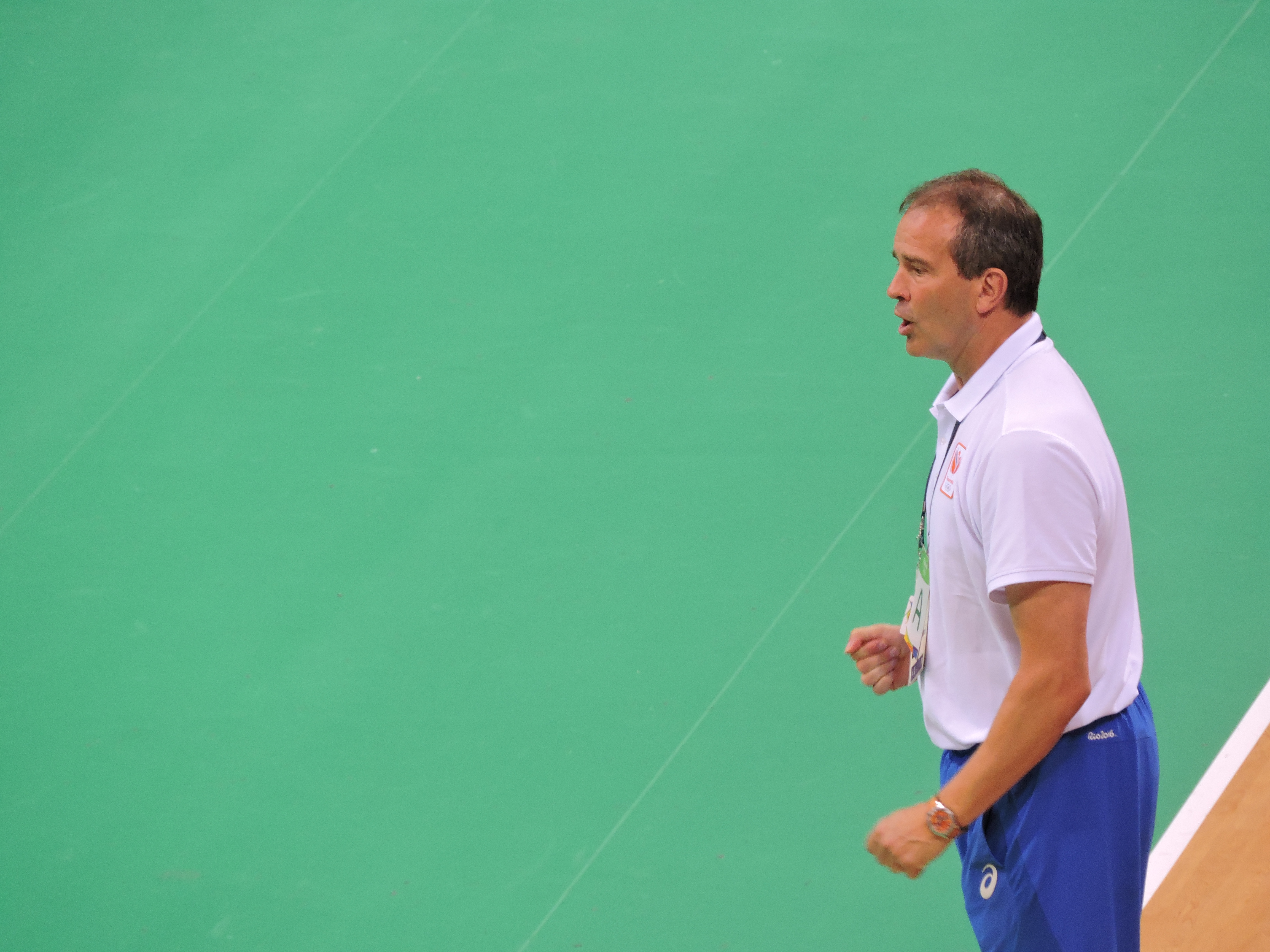 Técnico da Holanda, seleção que eliminou o Brasil na competição!